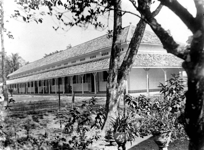 Repronegatief. Hollandsch-Chineesche School te Madiun, Oost-Java